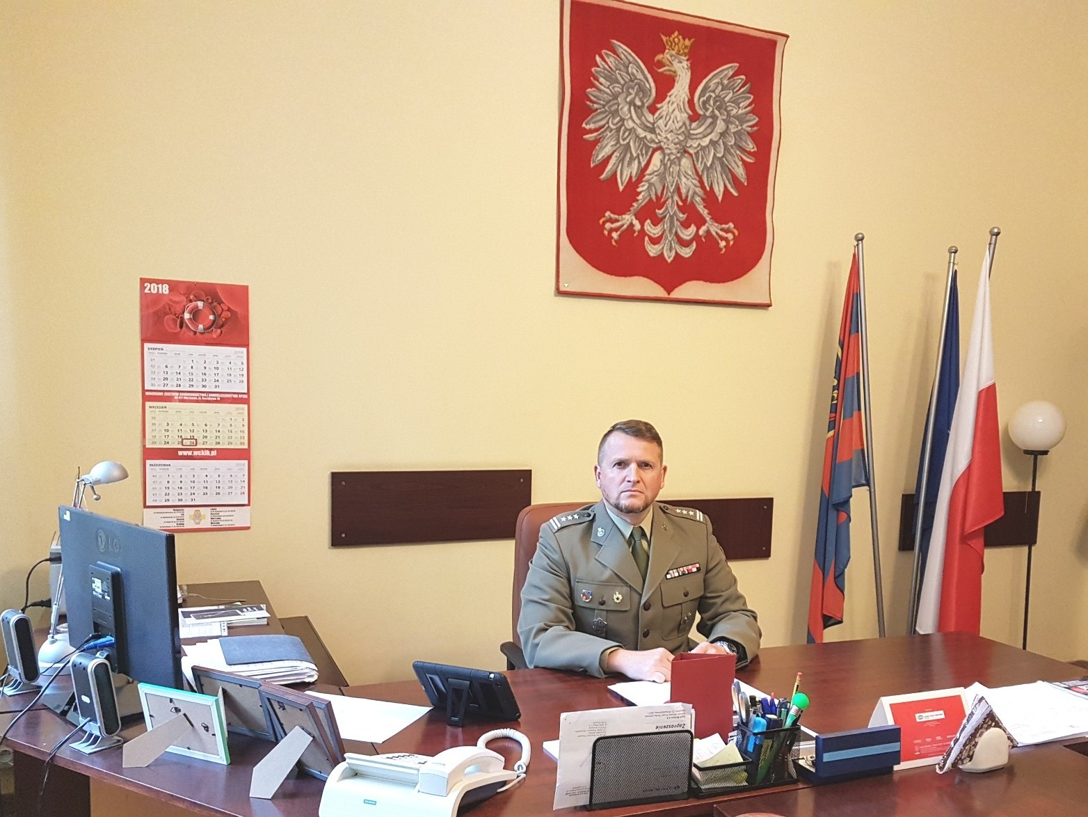 Komendant 109 Szpitala Wojskowego płk Krzysztof Pietraszko